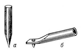 Беларуская (тарашкевіца): Грамафонная іголка